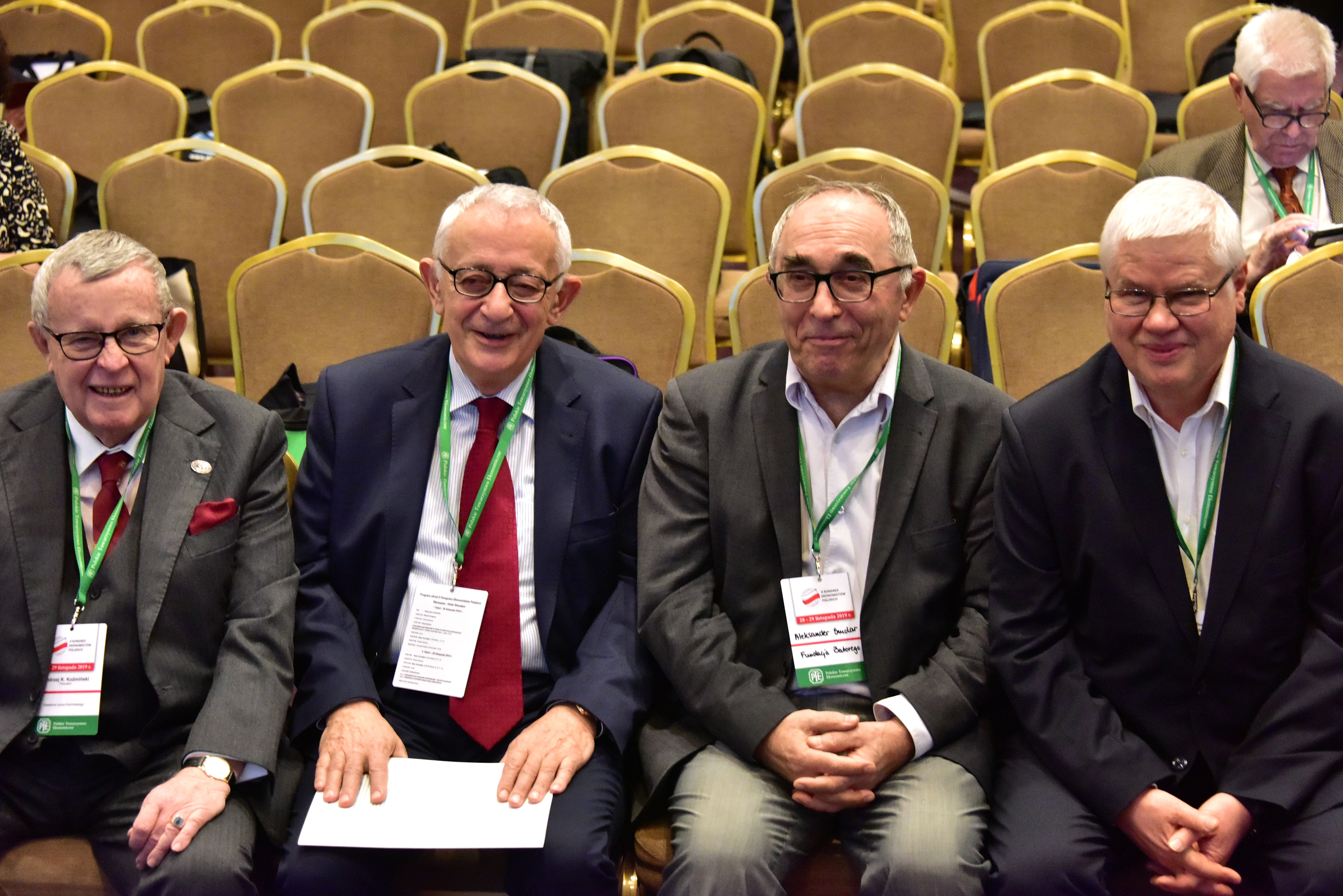 Profesorowie: Andrzej Koźmiński, Jerzy Osiatyński, Aleksander Smolar i Jerzy Hausne podczas X Kongresu Ekonomistów Polskich w hotelu Sheraton w Warszawie